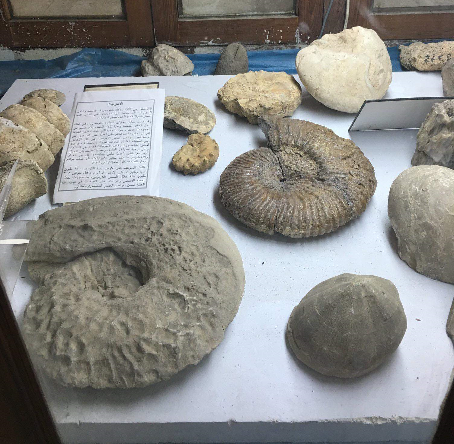 أمونيتات